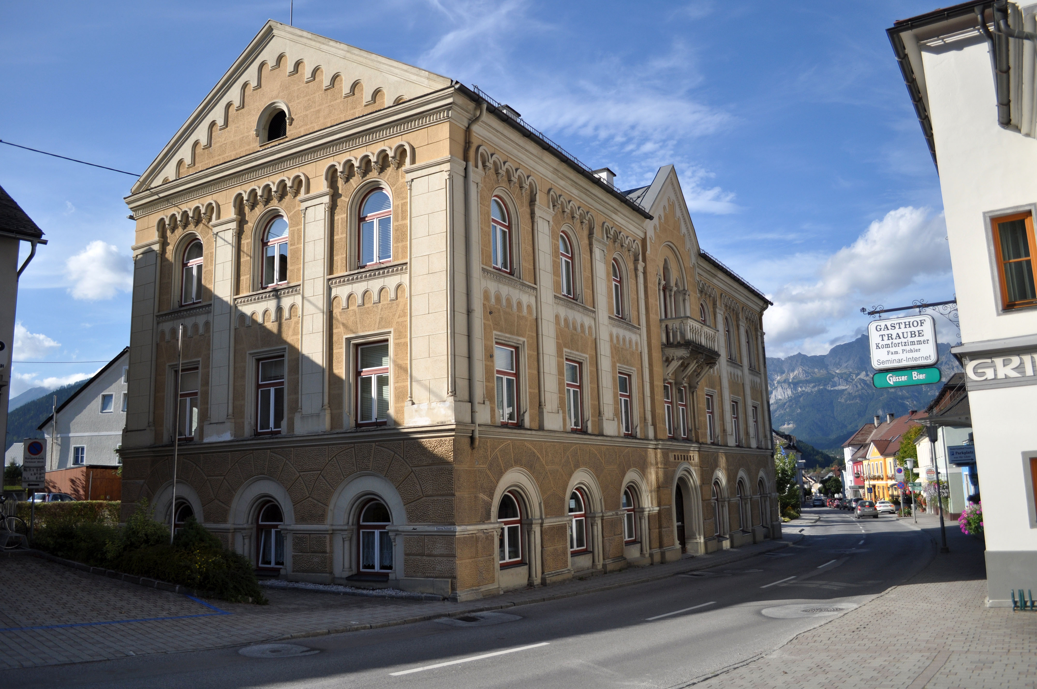 Rathaus